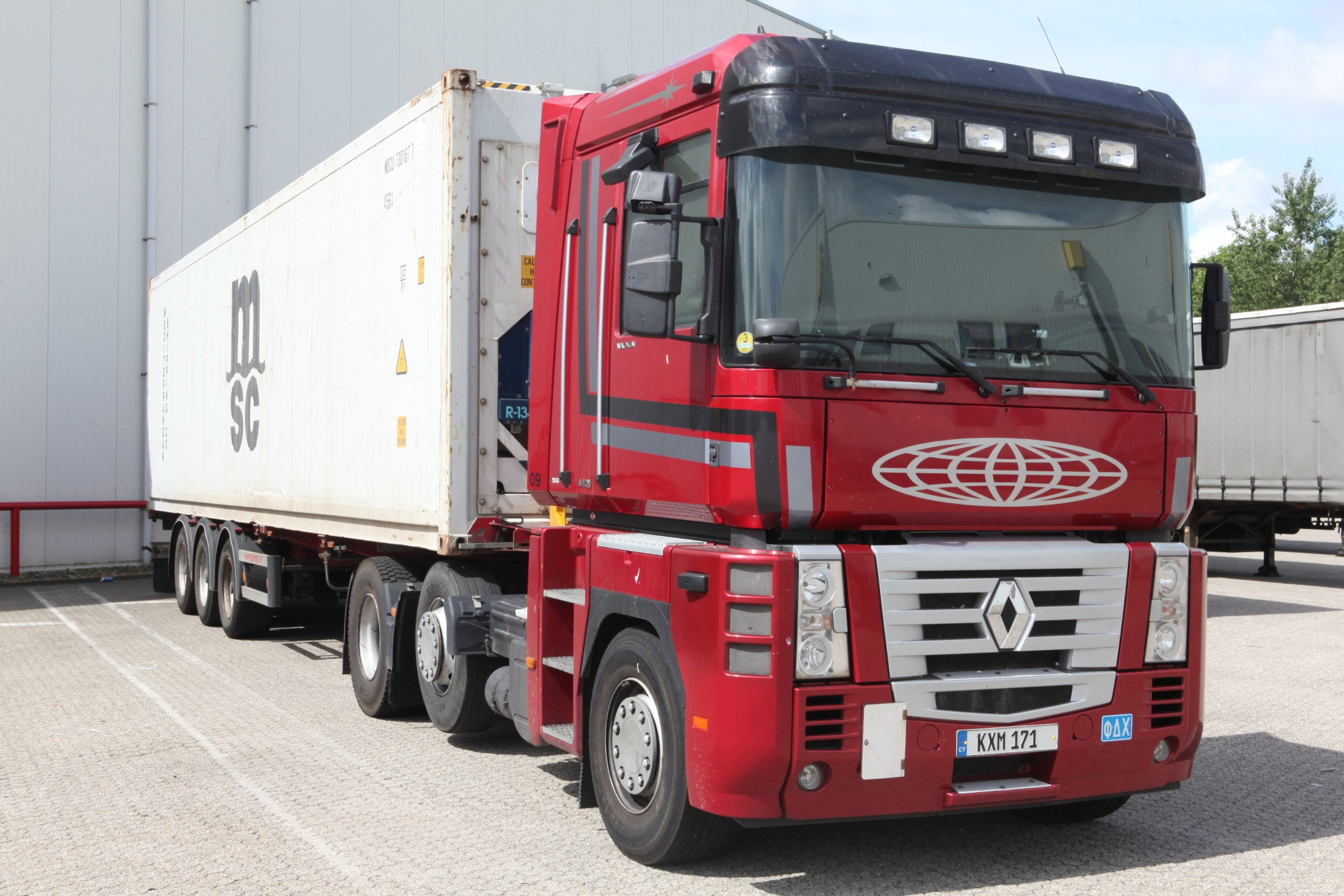 Renault Magnum 440 dxi truck